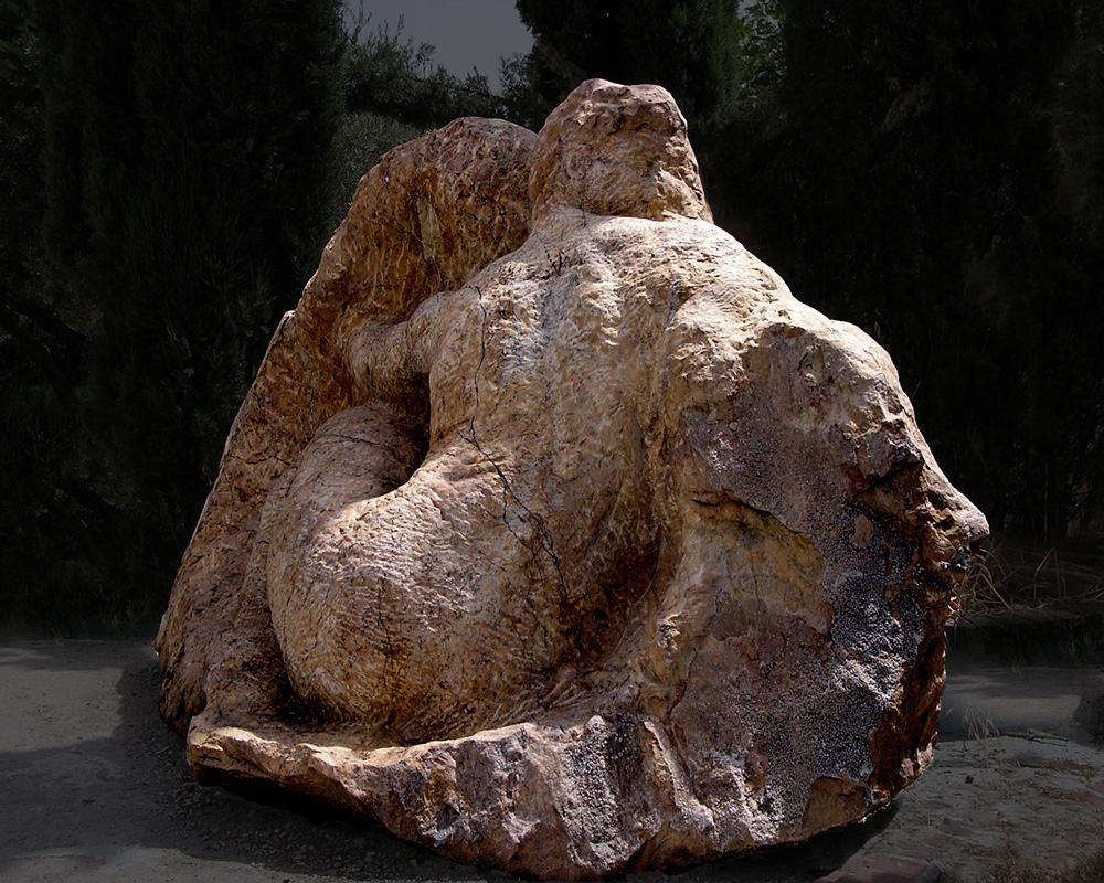 Leda - Majadahonda - Madrid